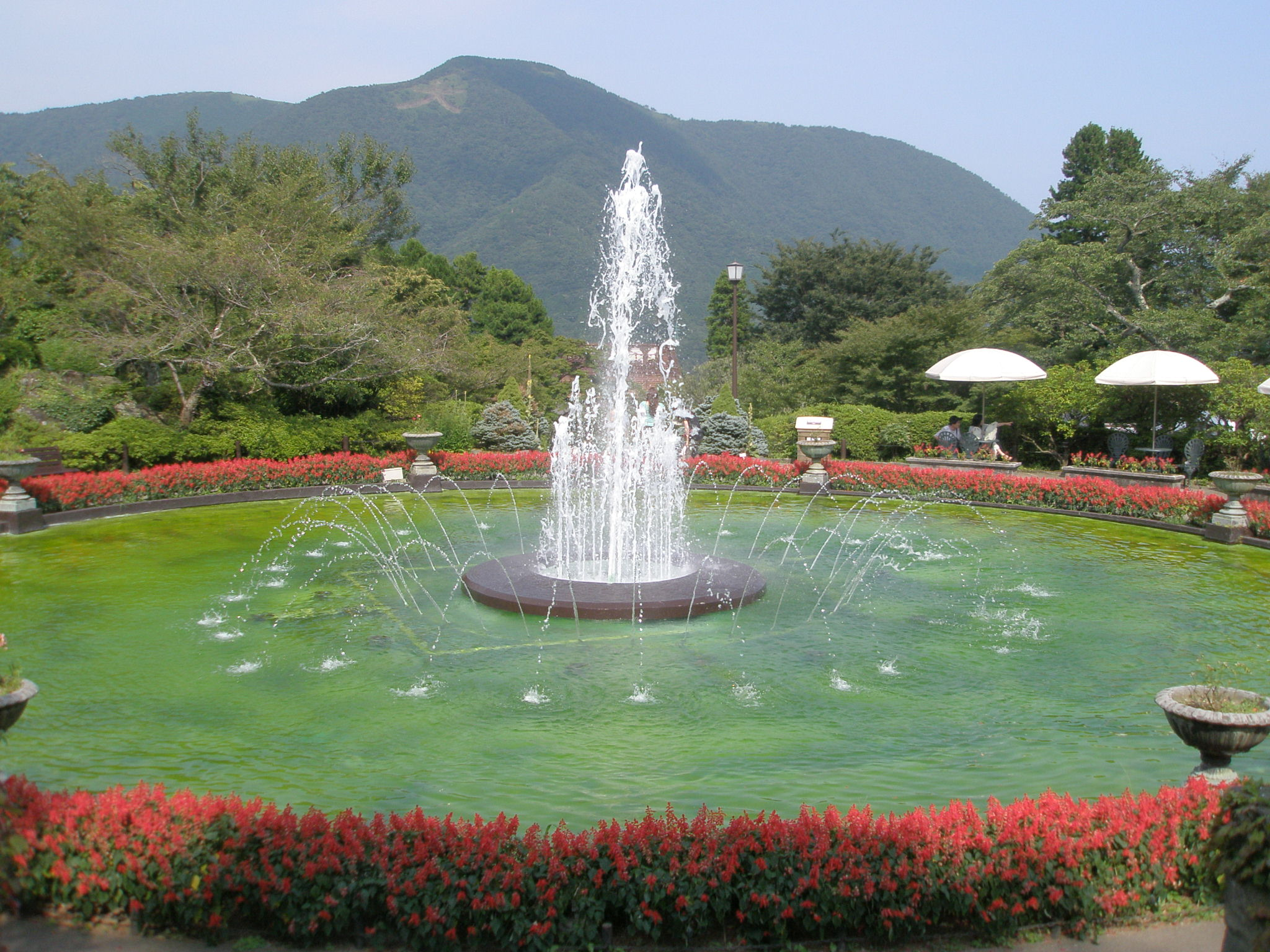 強羅公園、中央の噴水